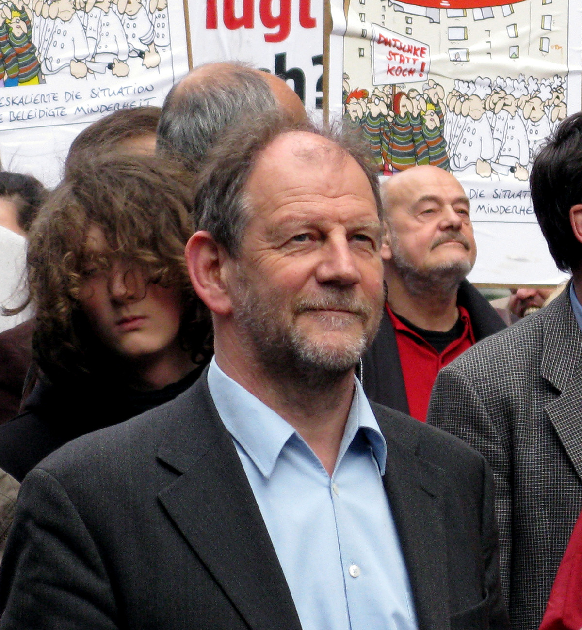 Michael Cramer, Mitglied des Europäischen Parlaments, bei der Umbenennung der Kochstraße in Rudi-Dutschke-Straße